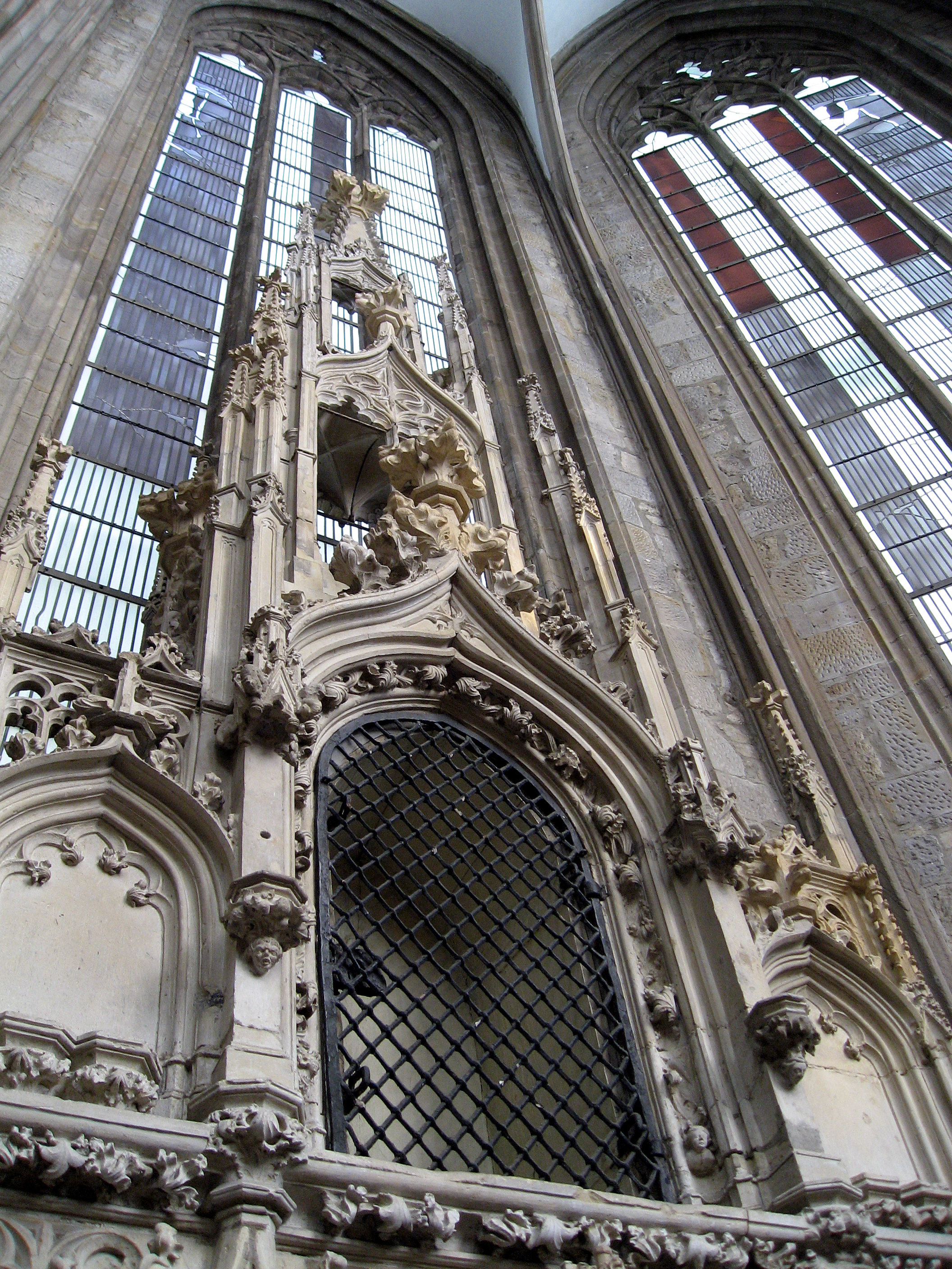 Dortmund, Marienkirche, Sakramentshaus um 1450, Sandstein; ursprünglich Aufbewahrungsort für Reliquien und liturgisches Gerät